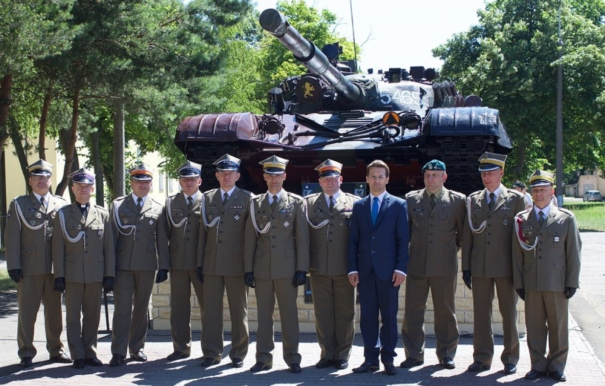 Dowódcy batalionu: płk Krzysztof Stachowiak (L ),ppłk Ryszard Rosner (P)